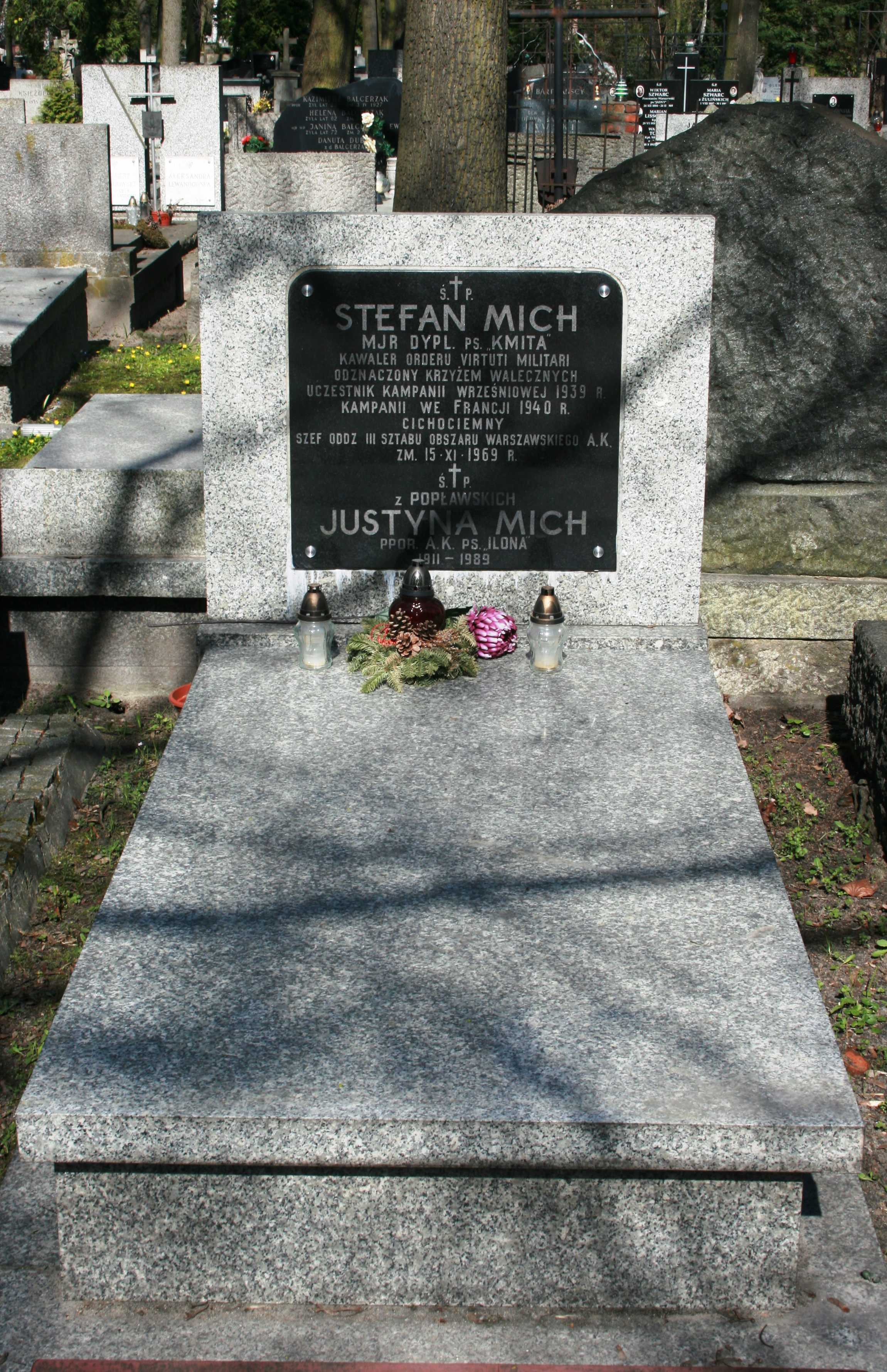 Grób na Powązkach Wojskowych w Warszawie